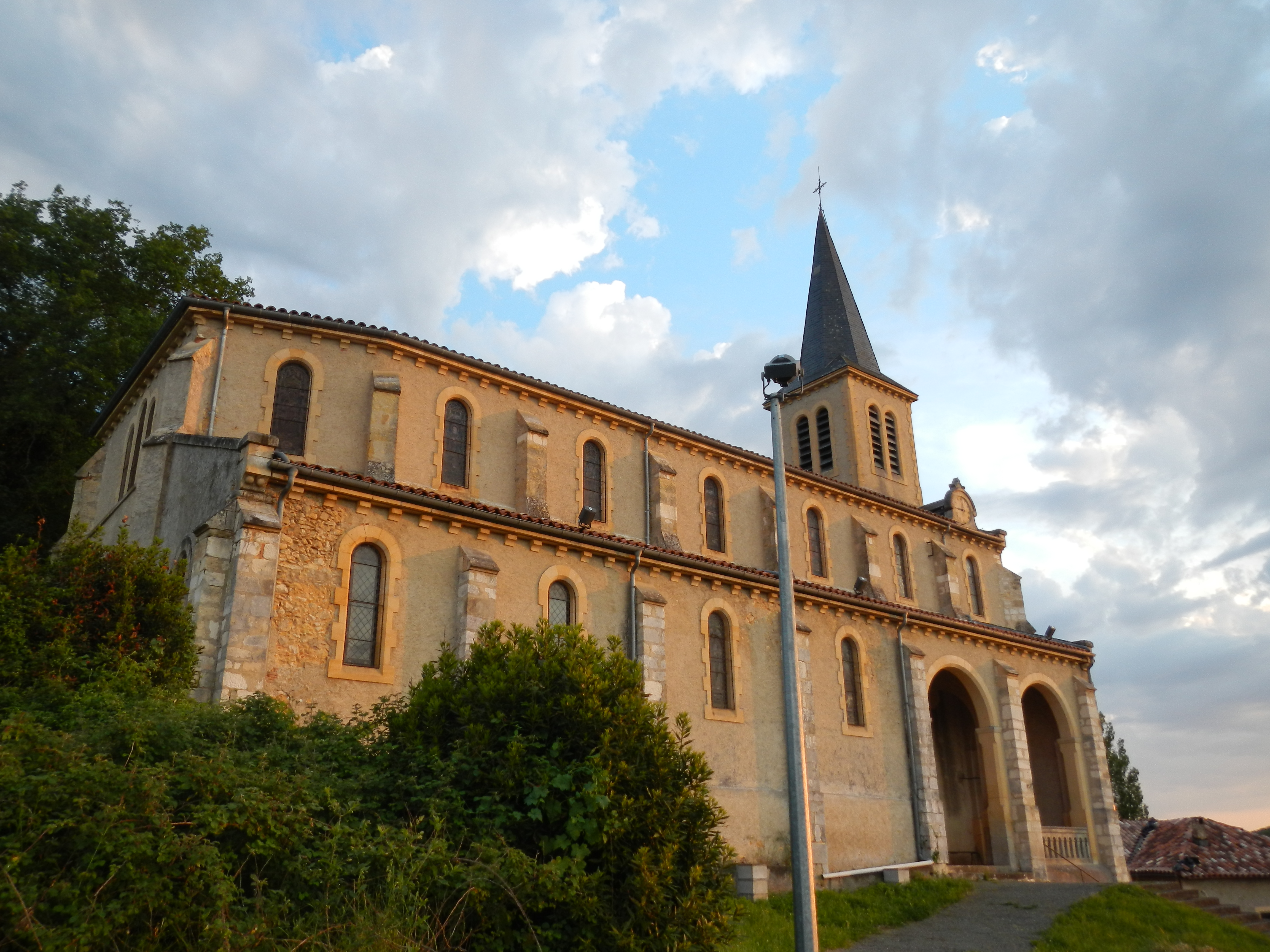 Boussan (31)